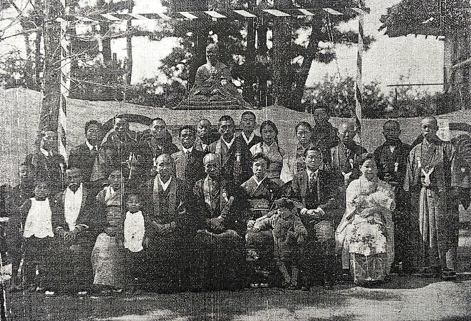 甲寅読書会 横井是旭氏寿像建設除幕式記念。